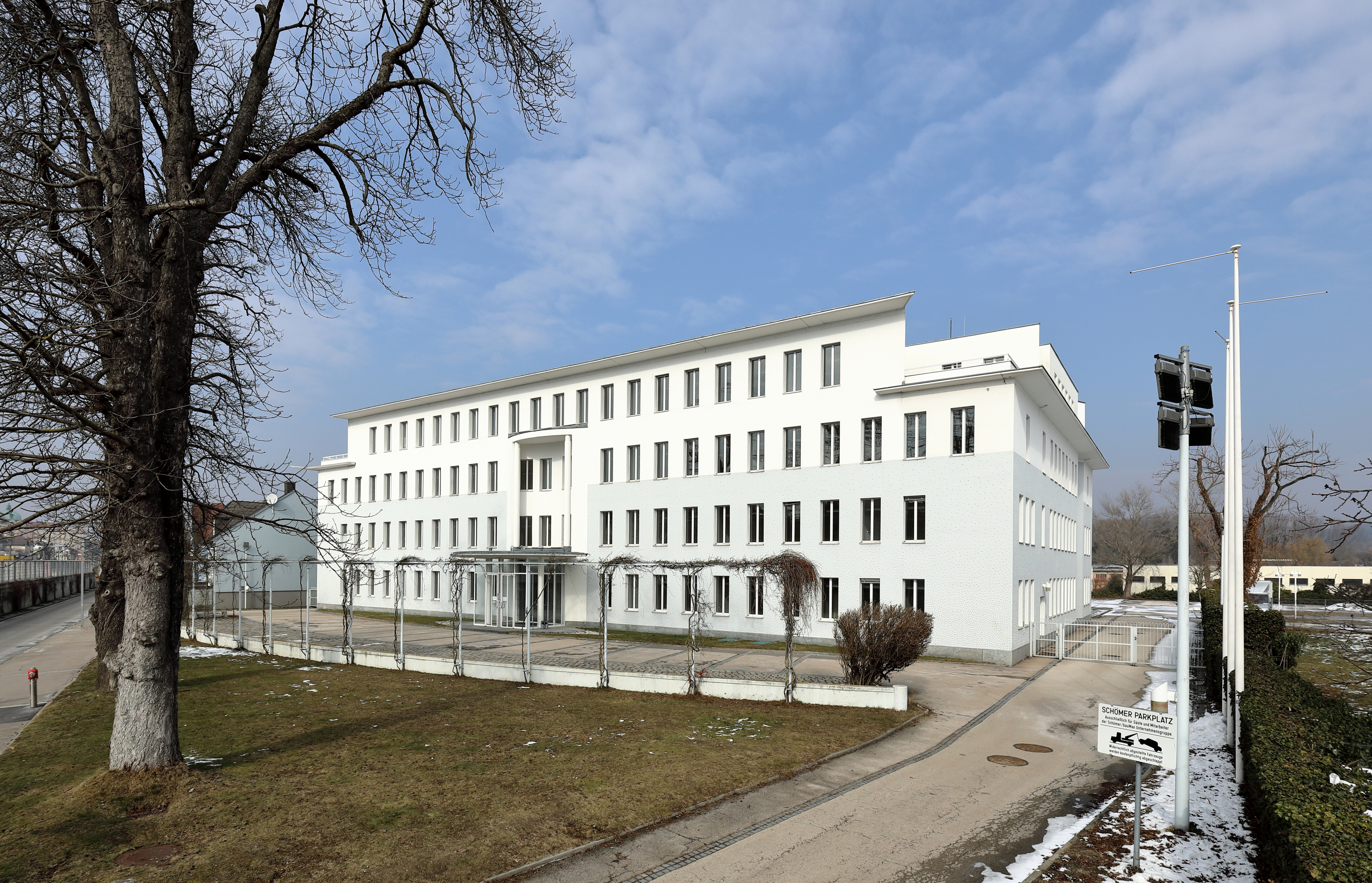 Das Schömer-Haus an der Adresse Aufeldgasse 17-23 in der Stadtgemeinde Klosterneuburg. Das Bürogebäude wurde 1987 nach den Plänen des Architekten Heinz Tesar errichtet und 1988 mit dem Österreichischen Bauherrenpreis ausgezeichnet. Bis zur Eröffnung des Essl Museums 1999 wurde die Eingangshalle als Ausstellungsraum für Teile der Sammlung Essl genutzt.